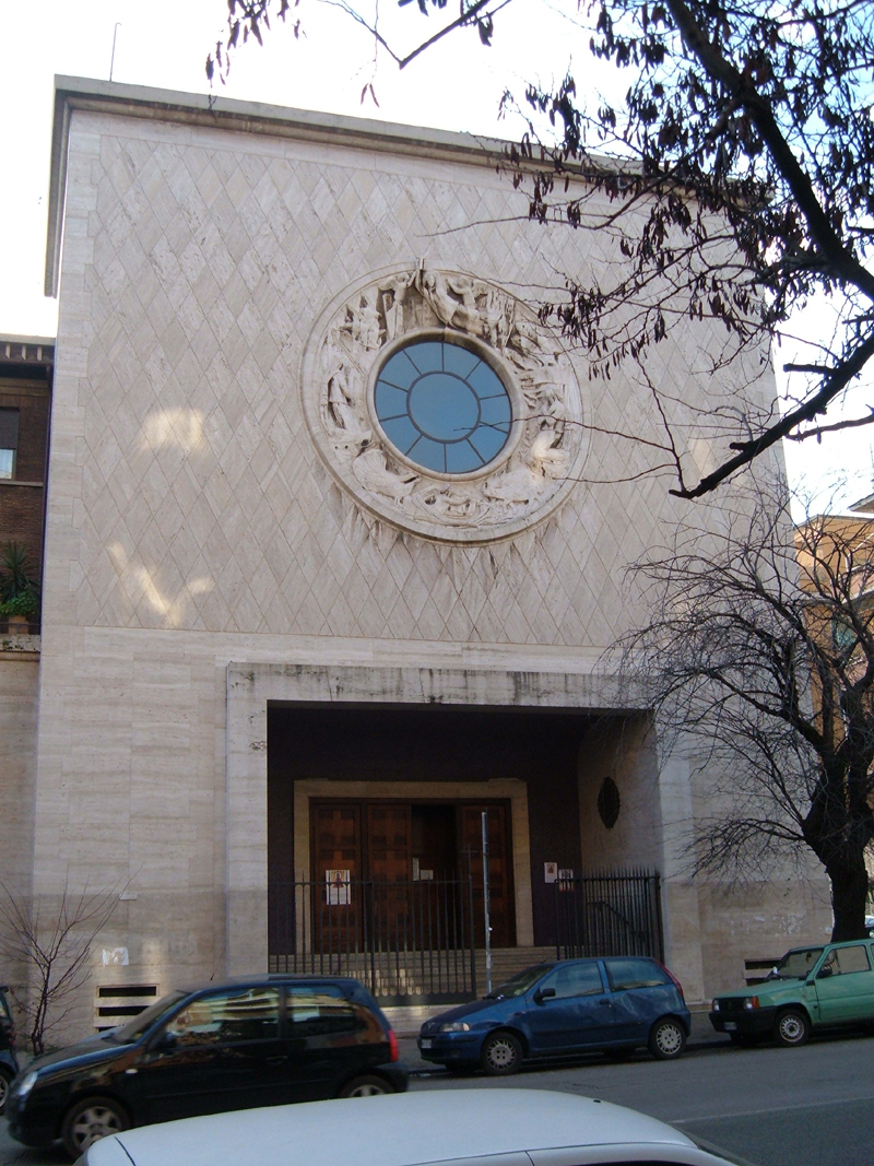 Chiesa di Sant'Orsola, a Roma, nel quartiere Nomentano.